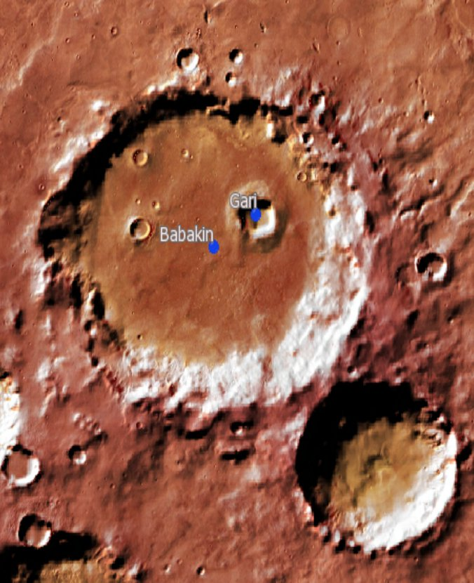 Cráter marciano Babakin. (Imagen IAU/USGS/Goddard/A SU/USGS)